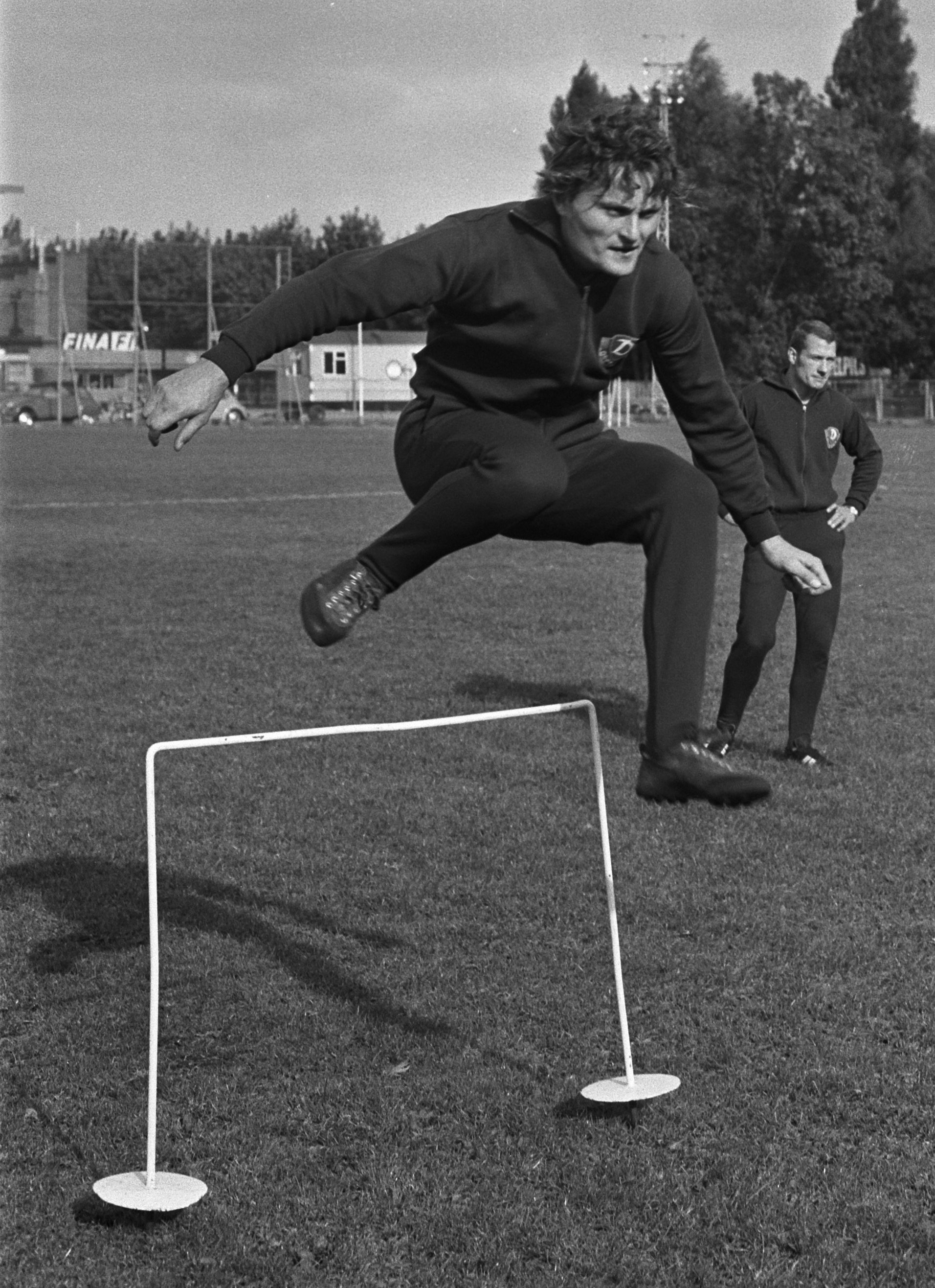 Collectie / Archief : Fotocollectie Anefo Reportage / Serie : [ onbekend ] Beschrijving : Dynamo Dresden traint op Ajax veld Amsterdam Datum : 13 september 1971 Locatie : Amsterdam, Noord-Holland Trefwoorden : sport, trainingen, voetbal Persoonsnaam : Dynamo Dresden Instellingsnaam : AJAX Fotograaf : Peters, Hans / Anefo Auteursrechthebbende : Nationaal Archief Materiaalsoort : Negatief (zwart/wit) Nummer archiefinventaris : bekijk toegang 2.24.01.05 Bestanddeelnummer : 924-9303